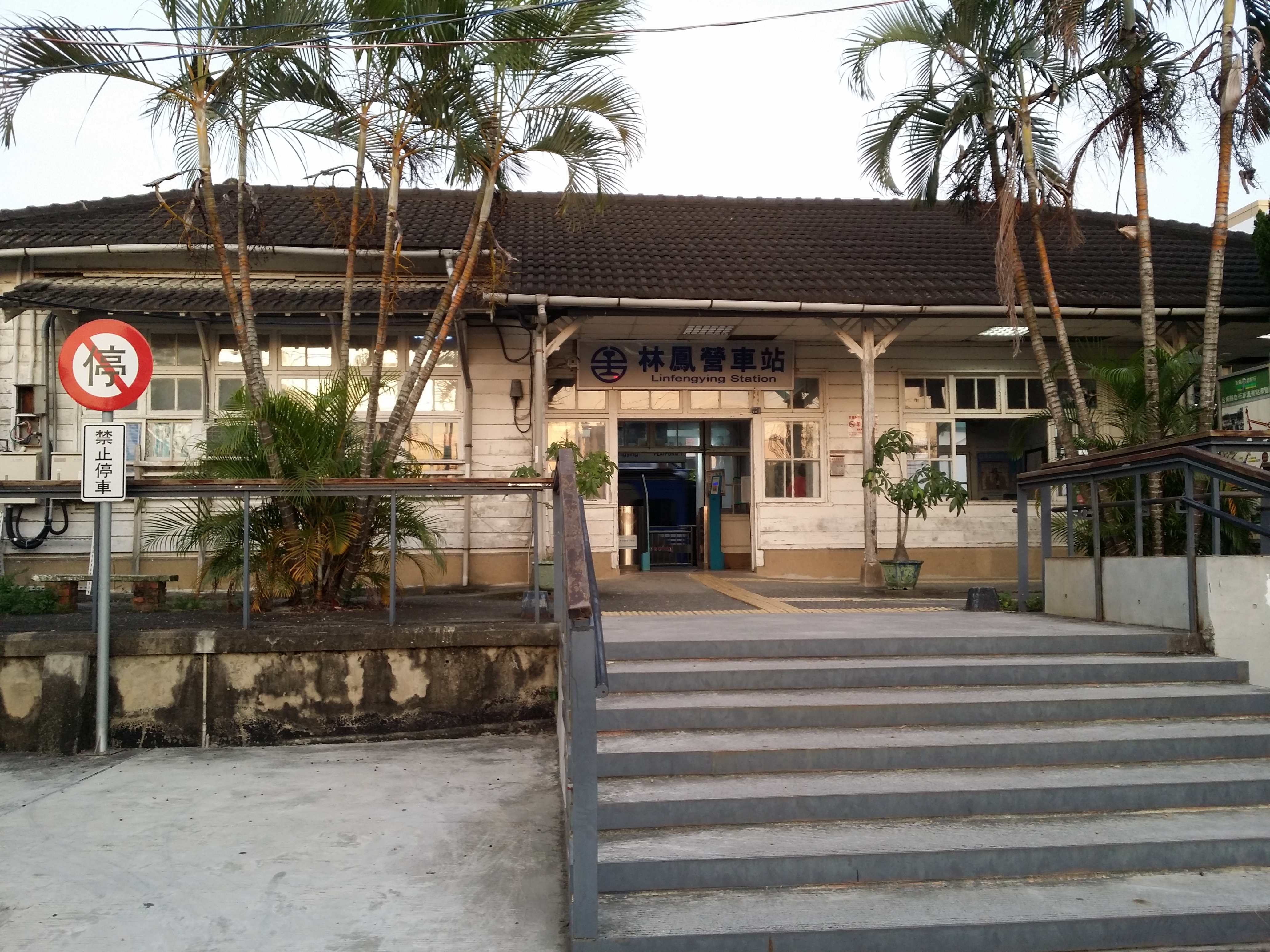 林鳳營車站從遠可以看到它建築物的古典美像似意謂著它的時間背景。